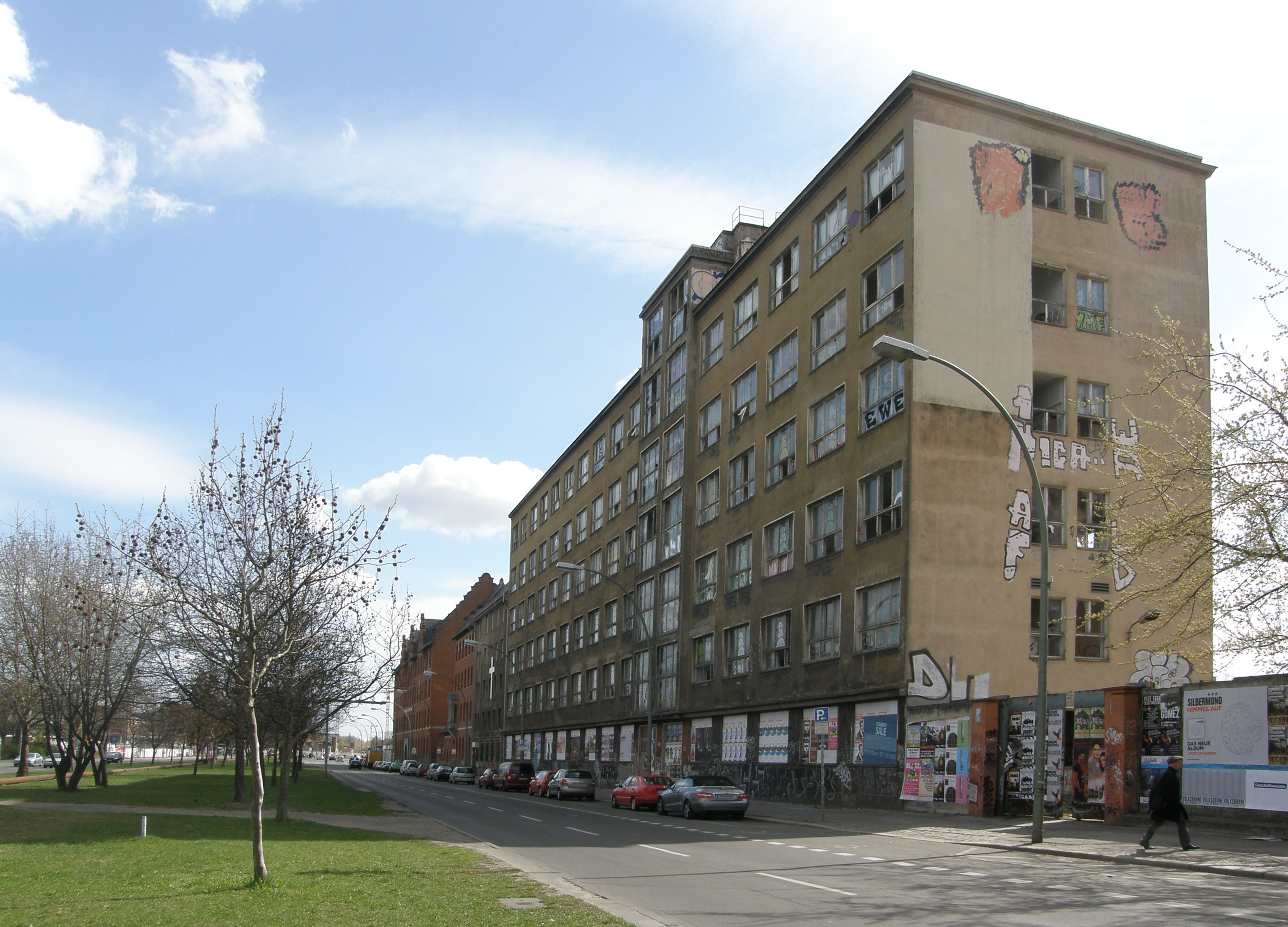 Berlin-Friedrichshain, Stralauer Platz, eh. Vergaser- und Filterwerke